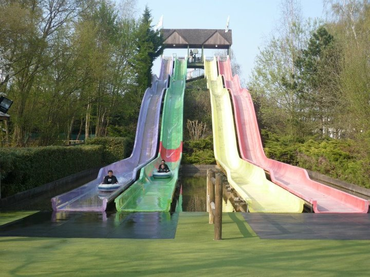 L'aquachute de Walygator Parc